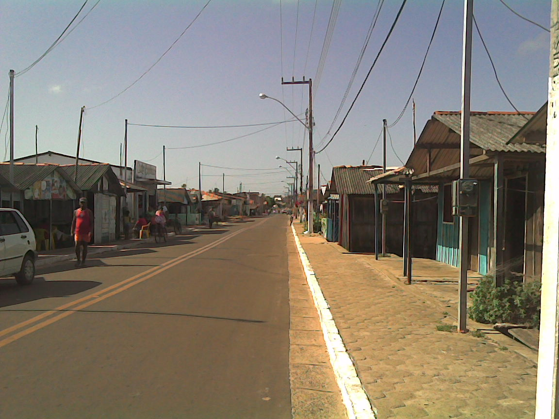 Município de Raposa, Maranhão, Brasil.